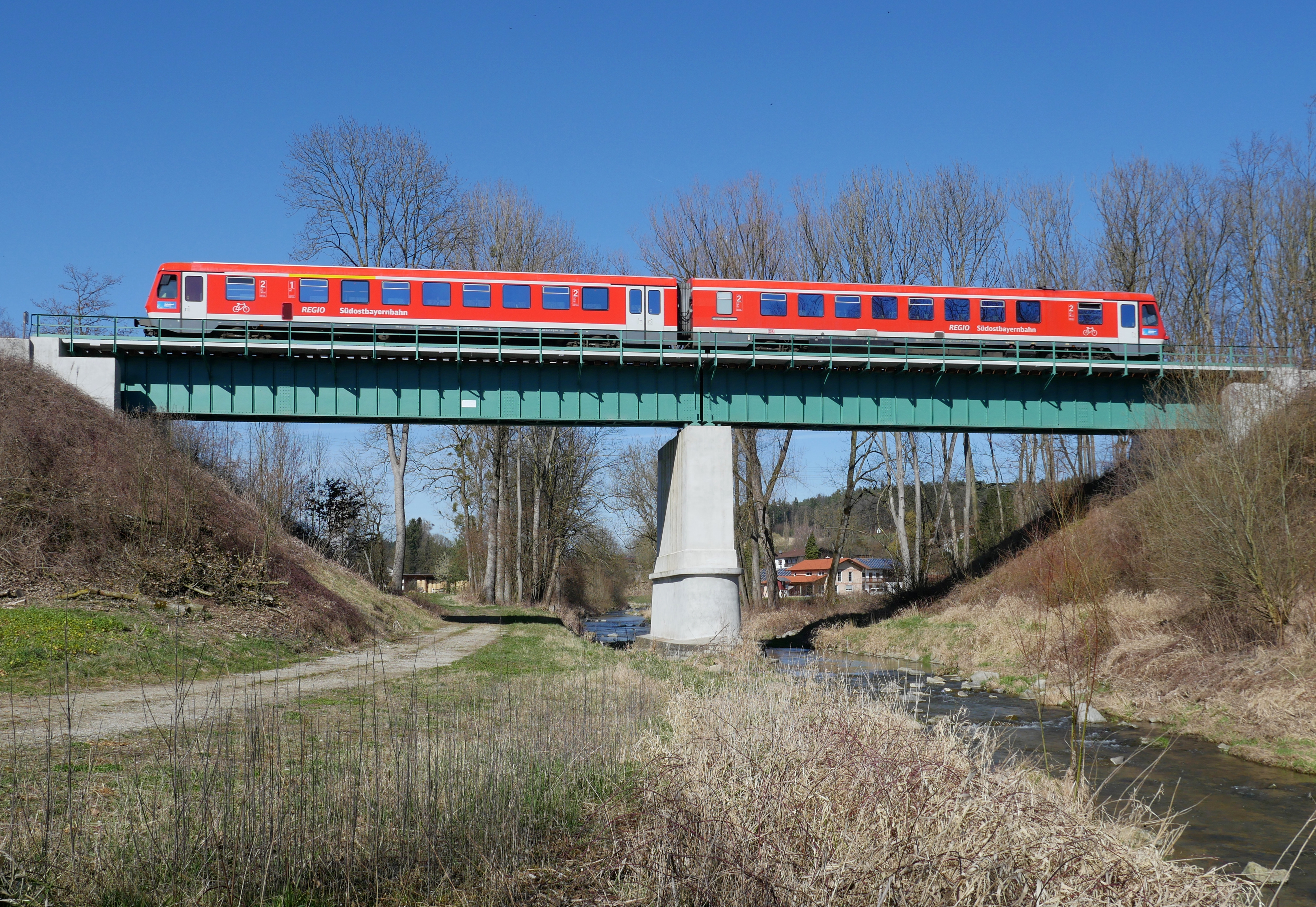 Eisenbahnbrücke der Bahnstrecke München–Simbach über den Türkenbach bei Stammham, darauf ein Dieseltriebwagen der Baureihe 628.4 als RB 27270 von Simbach nach Mühldorf.